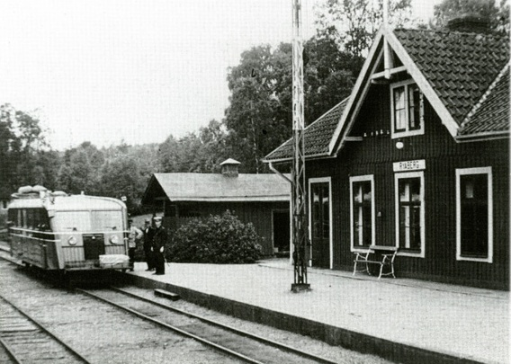 Swedish railway station Ryaberg, Halmstad-Bolmens Järnväg